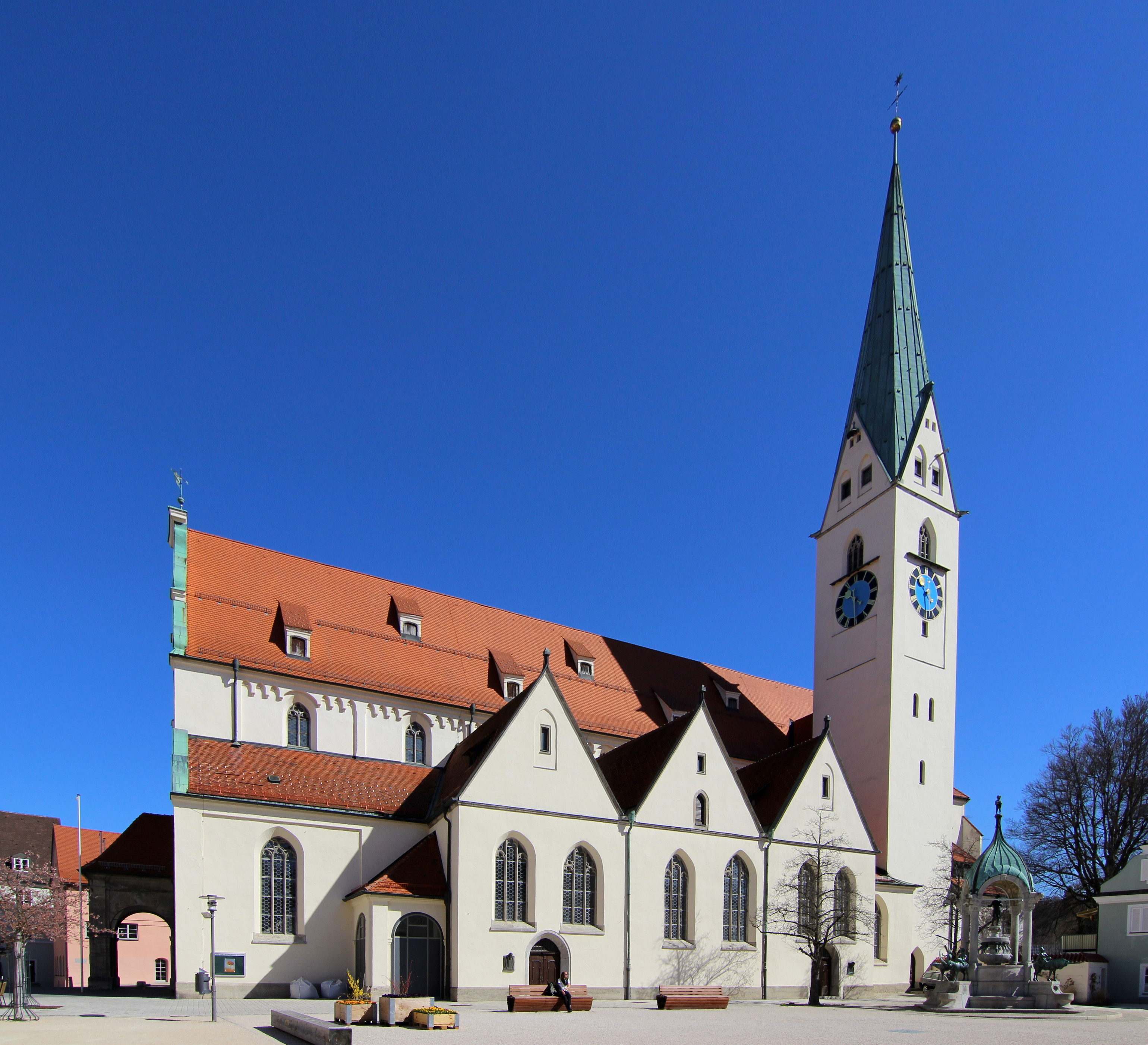 Kirche St. Mang, Kempten